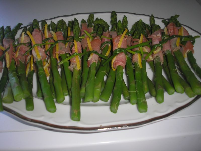 Asperges au jambon